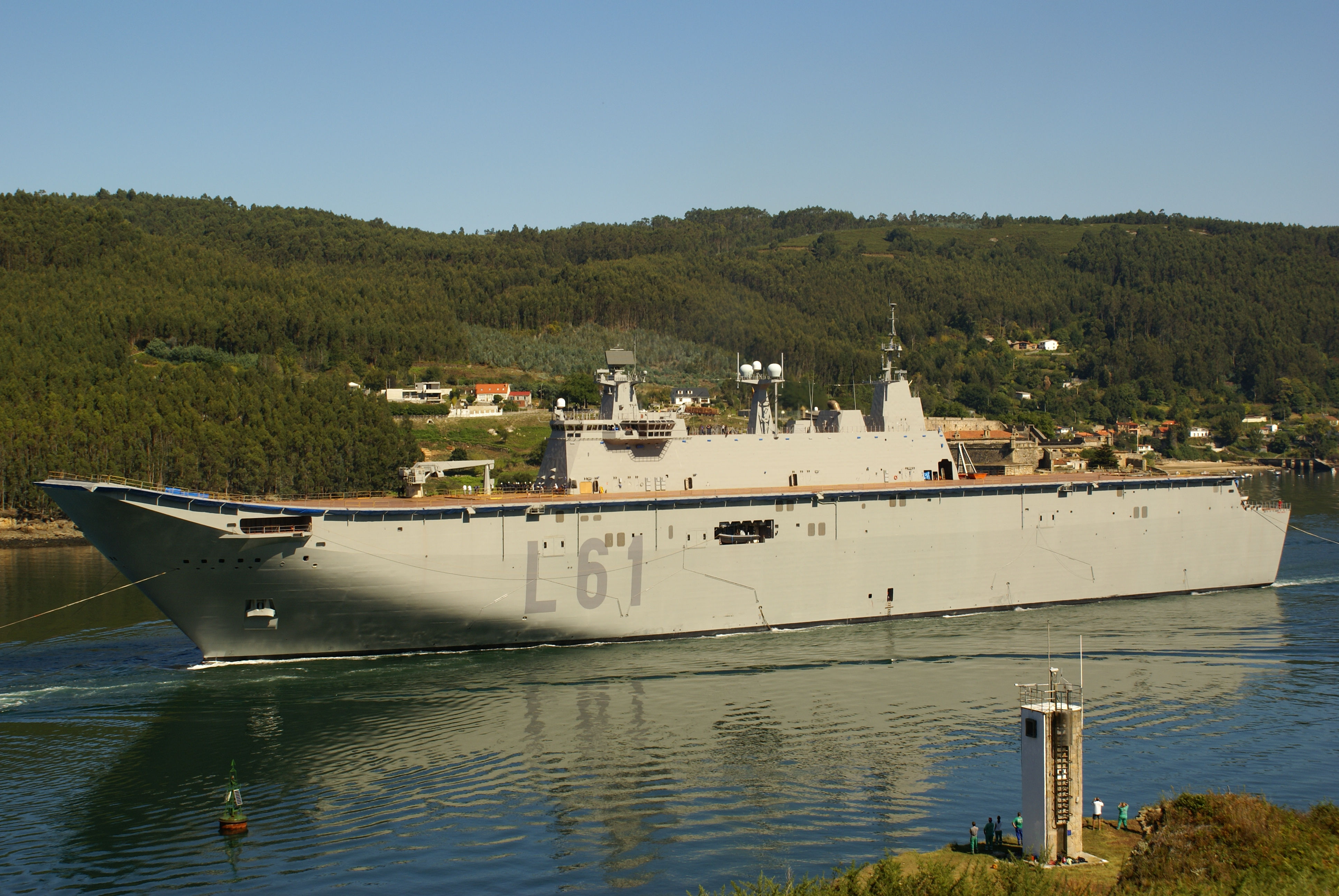 LHD Juan Carlos I (L-61) . Clase Juan Carlos I de la Armada Española, saliendo por la Ría de Ferrol en pruebas de mar.